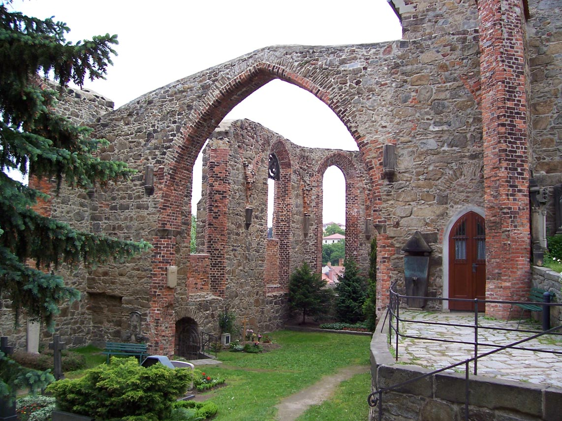 Ruine der Nikolaikirche in Bautzen Hornjoserbsce: Ruina Mikławskeje cyrkwje w Budyšinje.